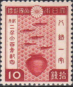 日本紀元2600年記念切手のうち、日本の建国神話を題材とした10銭切手